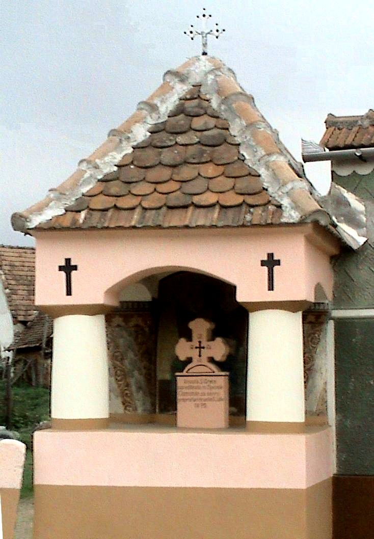 Troiţa (crucea) dinspre Avrig, din Racoviţa, Sibiu. Ultima renovare a fost făcută în 1970 cu ocazia pictării bisericii în interior de către pictorul bucureştean Dumitru Bănică.